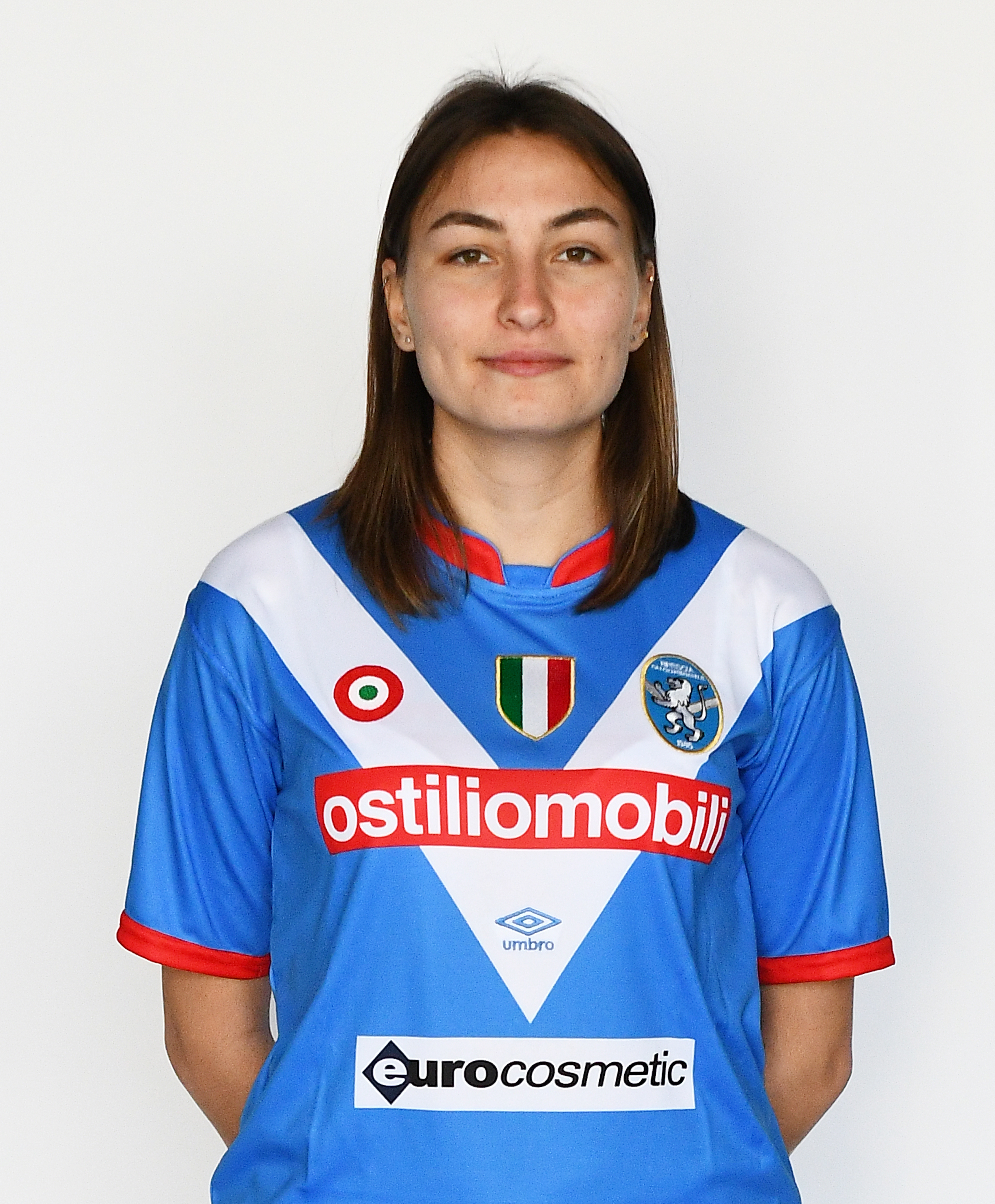 Ekaterina Tyryškina, centrocampista, foto ufficiale Brescia Calcio Femminile stagione 2016-2017.